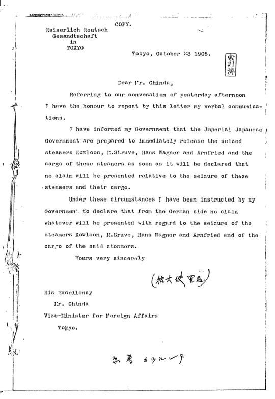 Нота японского правительства о германских судах задержанных за контрабанду в русско-японскую войну 1904-1905 гг.